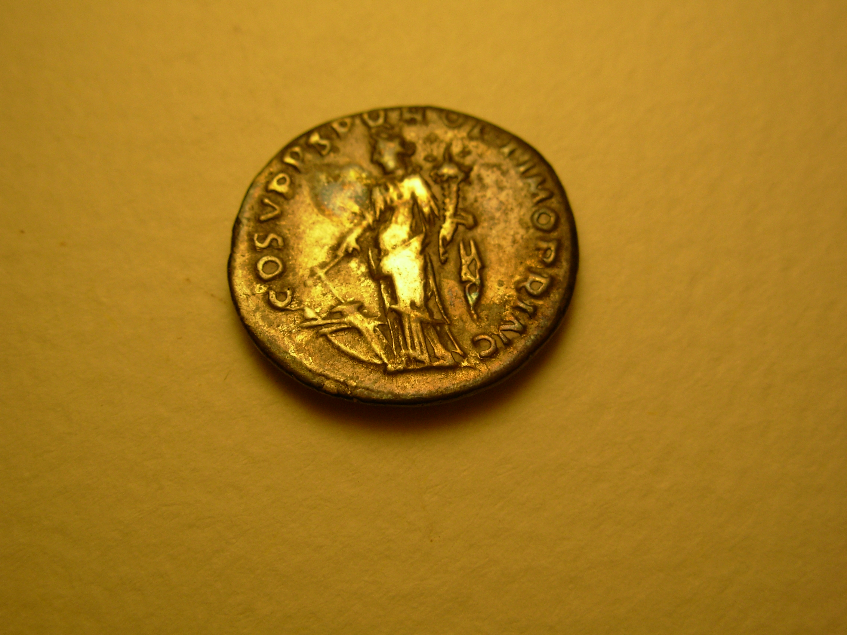 Moneta d'argento dell'Imperatore Traiano (retro)